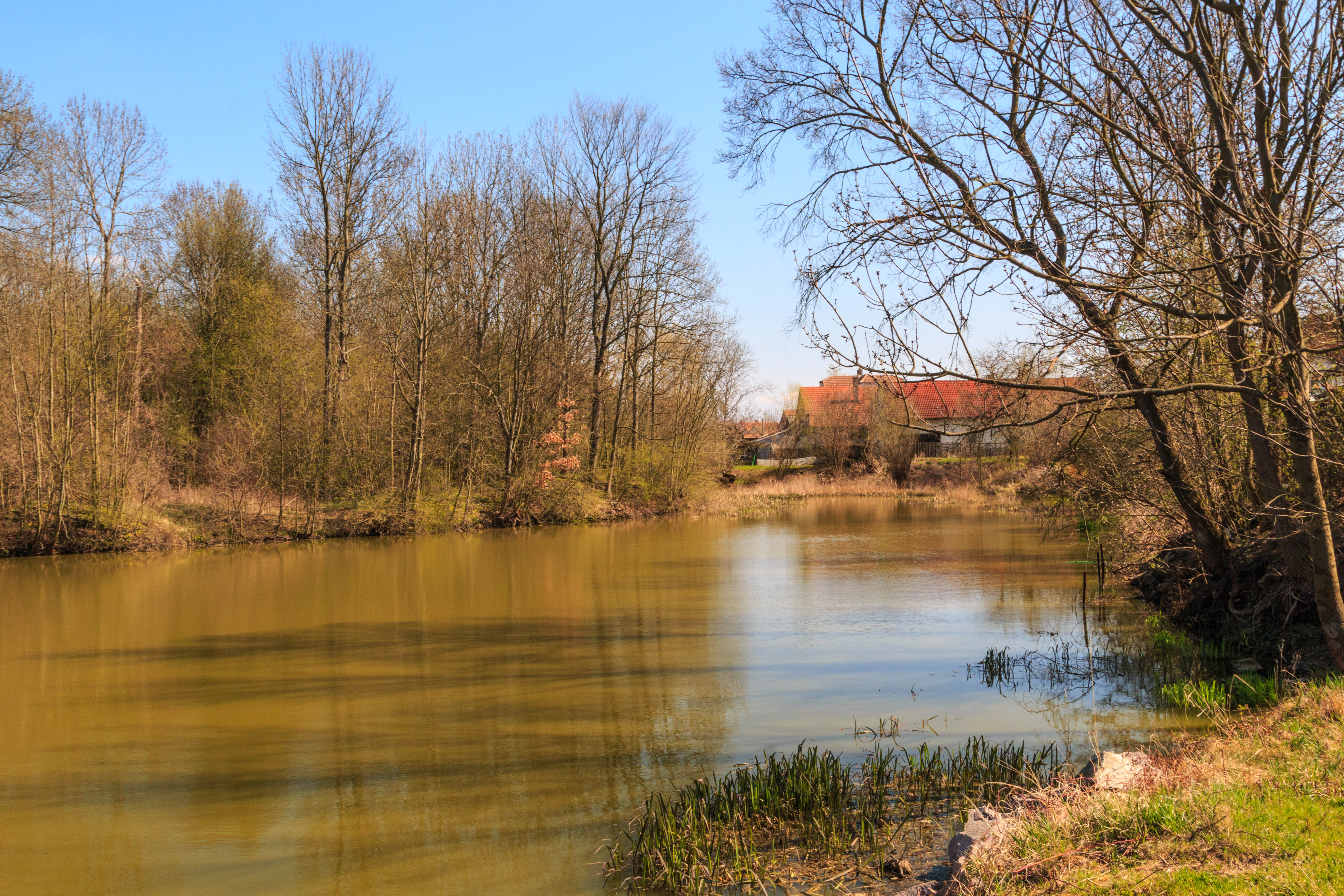 Rybník Přehrada u Labětína Project: Vodstvo.